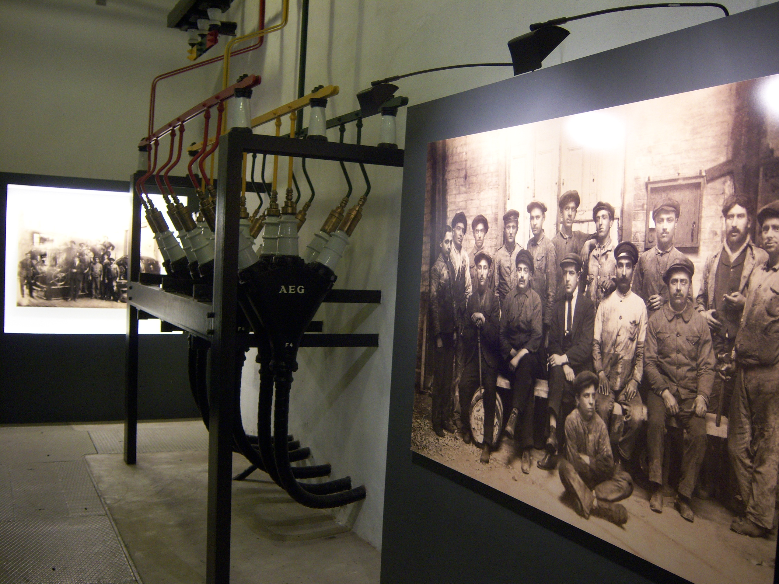 Exposição permanente Rostros da Central Tejo, junto aos geradores.